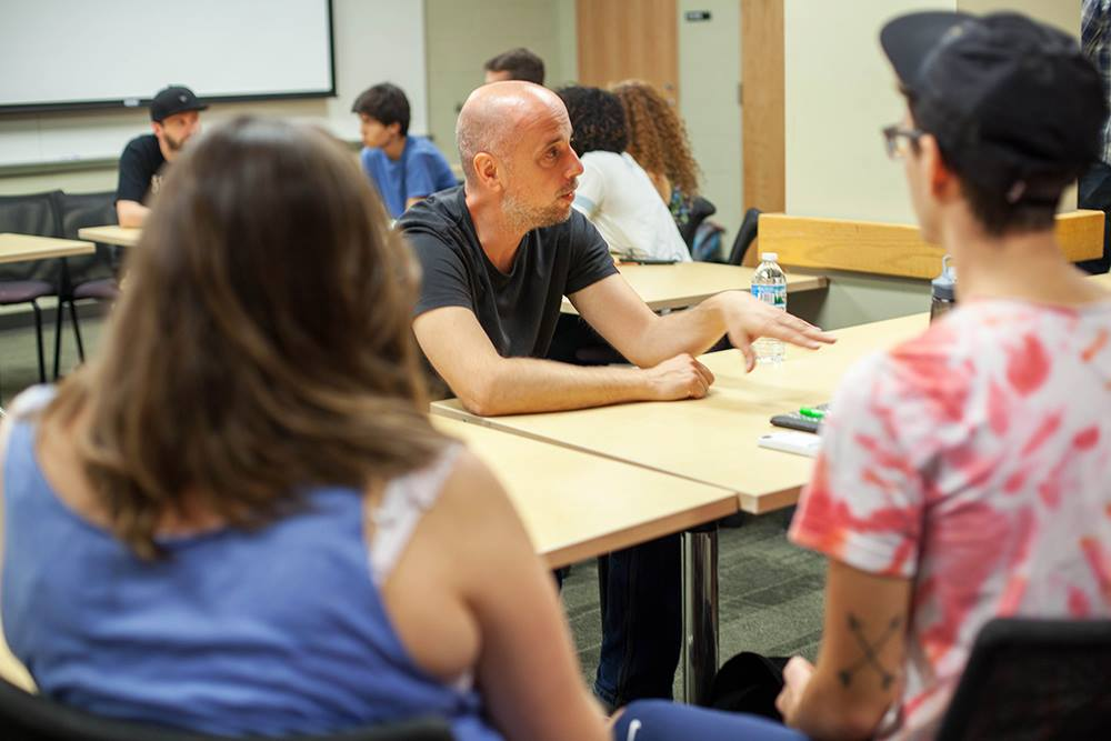 Dalibor Marković im Gespräch mit Studenten der University of Michigan